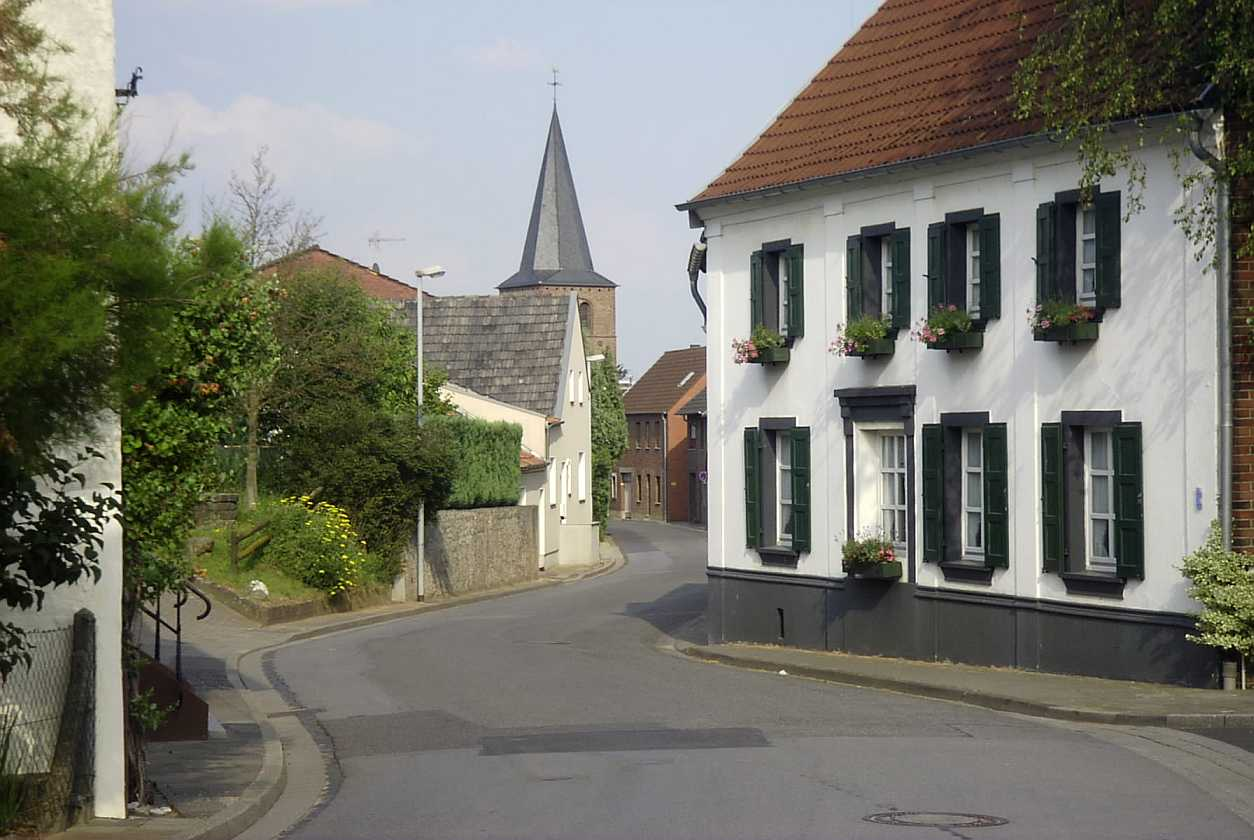 Summary Bildbeschreibung: Boslar Quelle: eigenes Foto Fotograf/Zeichner: bodoklecksel 14:20, 1. Jul 2006 (CEST) Datum: Juni 2006 Sonstiges